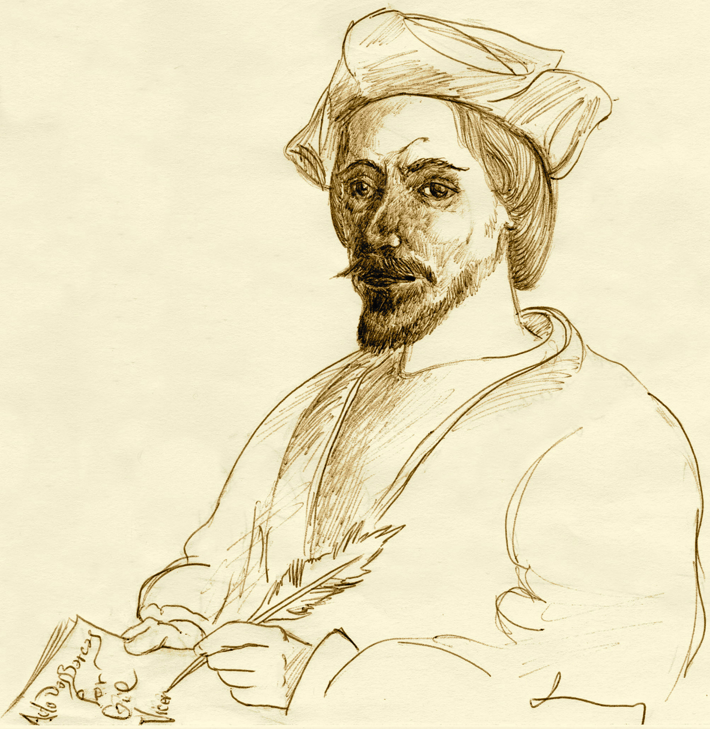 Gil Vicente écrivant un Auto da barca